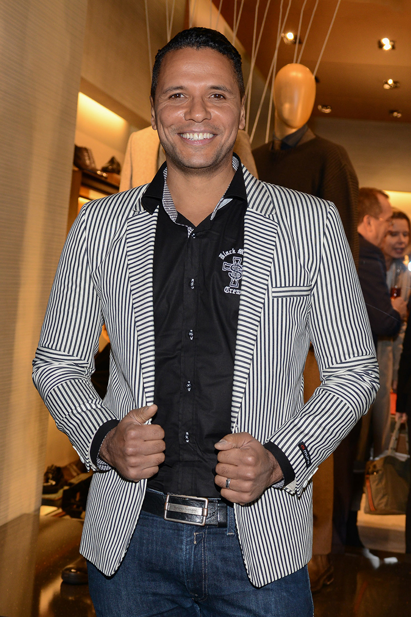 Kena Amoa während einer Geschäftseröffnung auf der Köningsallee in Düsseldorf am 25. September 2014.